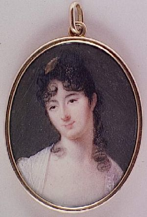 Pauline Fourès maîtresse de Bonaparte en Egypte